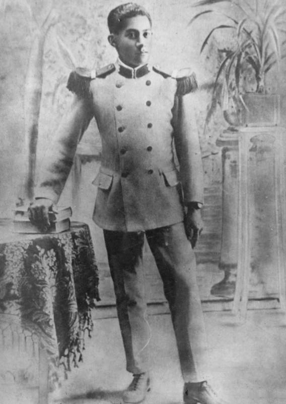 Ariipaea Pomare